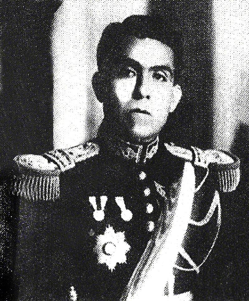 Luis Sanchez Cerro